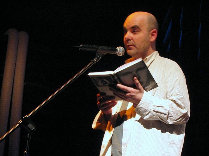 Edward Pasewicz, Polish poet